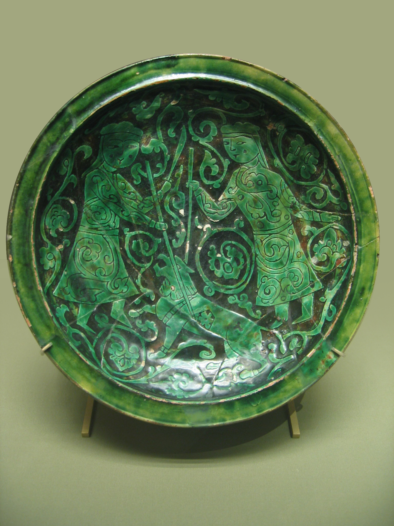 Coupe aux chasseurs, MAO 259 Iran du nord-ouest, XIIe-XIIIe siècle Céramique argileuse, décor champlevé et gravé sur engobe et sous glaçure colorée Musée du Louvre, Paris Auteur de la photo : Fabos, 6/6/05